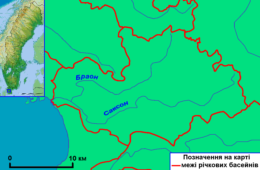 Карта річки Саксон у лені Сконе у Швеції. Створено на основі карти річок лену Готланд Skåne län на сайті SMHI Шведського інституту метеорології та гідрології.